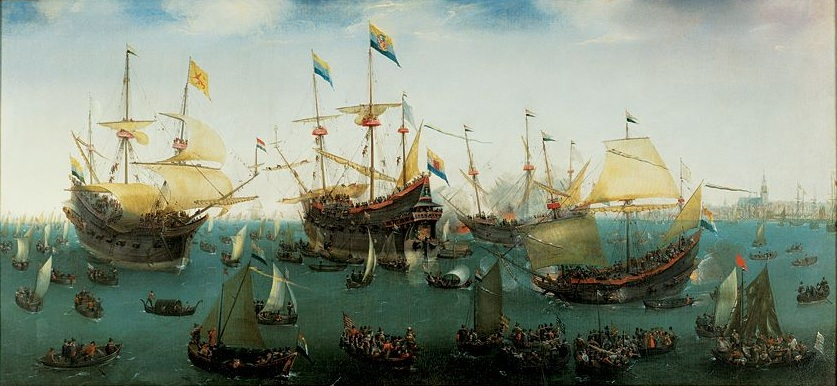 Tjuiskomst van JC van Neck